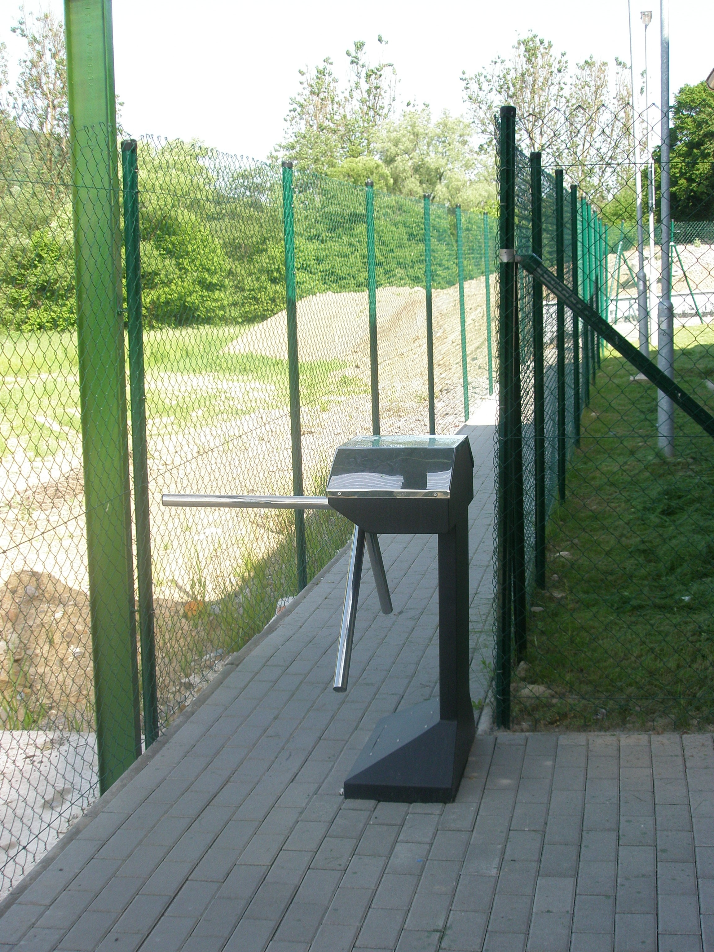 Przejście graniczne Ubla-Mały Bieriezny